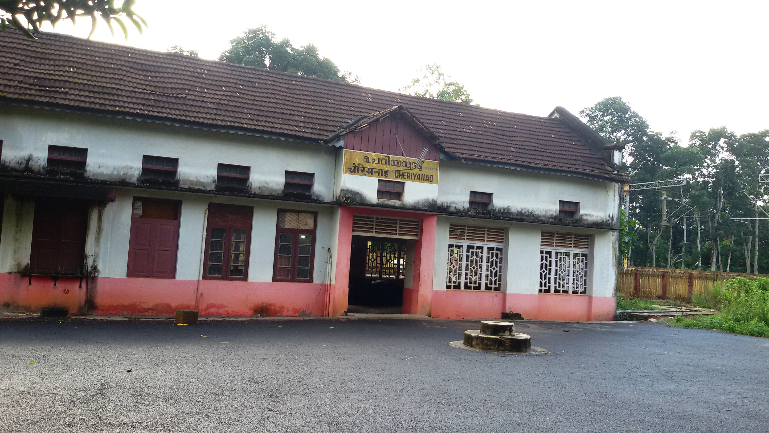 ചെറിയനാട് തീവണ്ടിയാപ്പീസ്